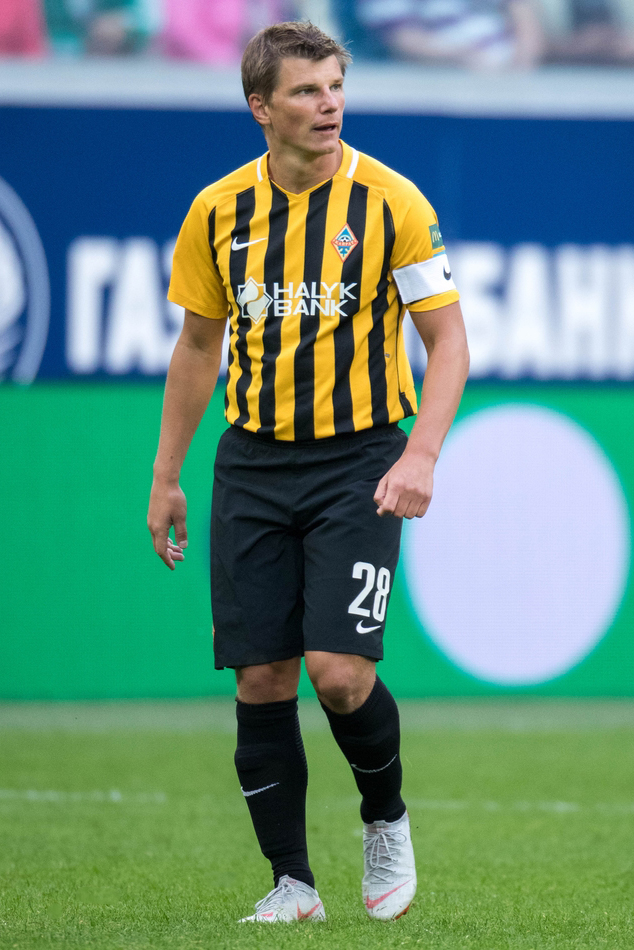 09.09.2018. Россия, Санкт-Петербург, стадион «Санкт-Петербург». Товарищеский матч «Зенит» — «Кайрат»